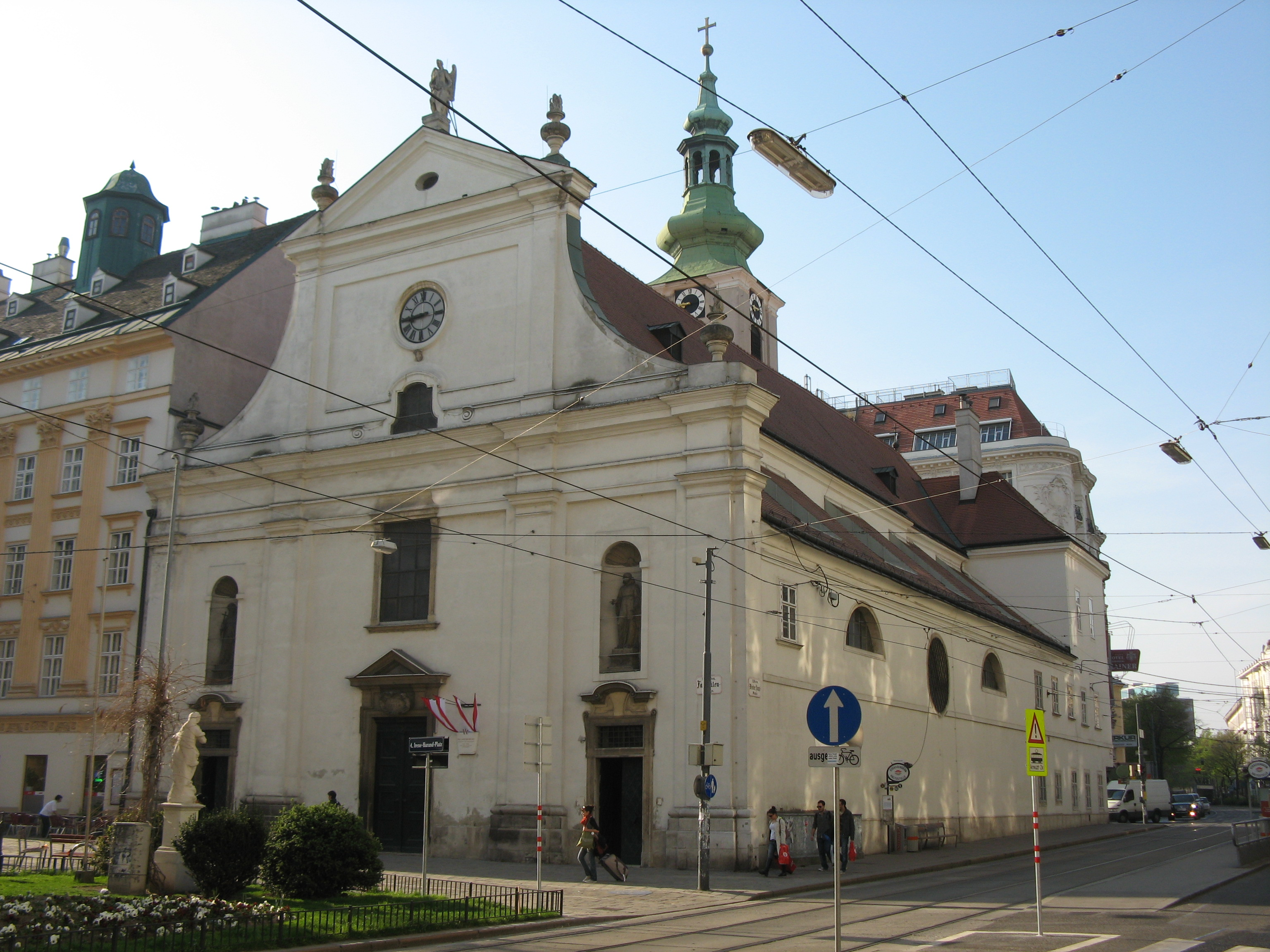 Paulanerkirche, Wiedner Hauptstraße, Wien-Wieden